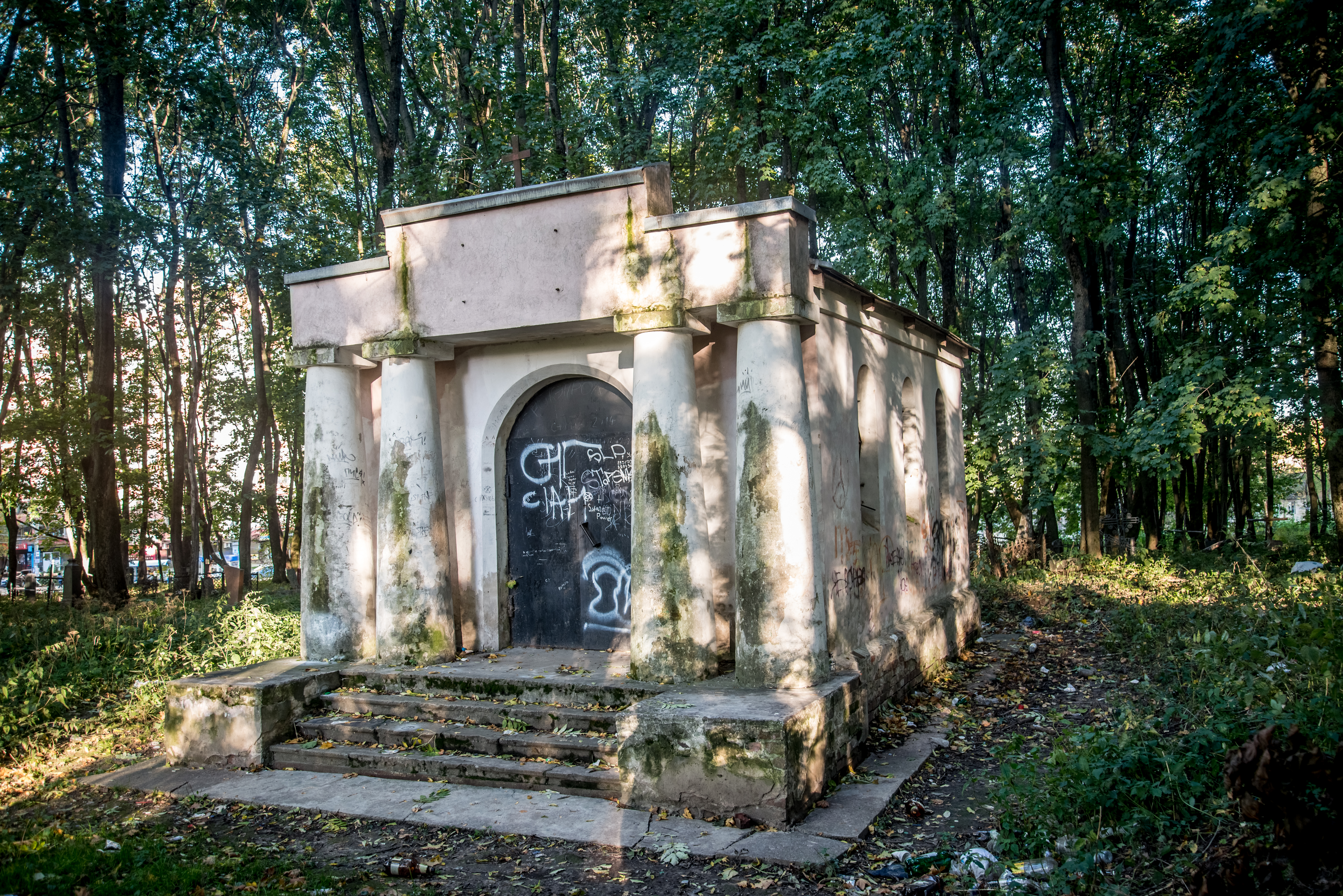 Склеп-усыпальница: улица Урицкого, Смоленск, Смоленский район, Смоленская область